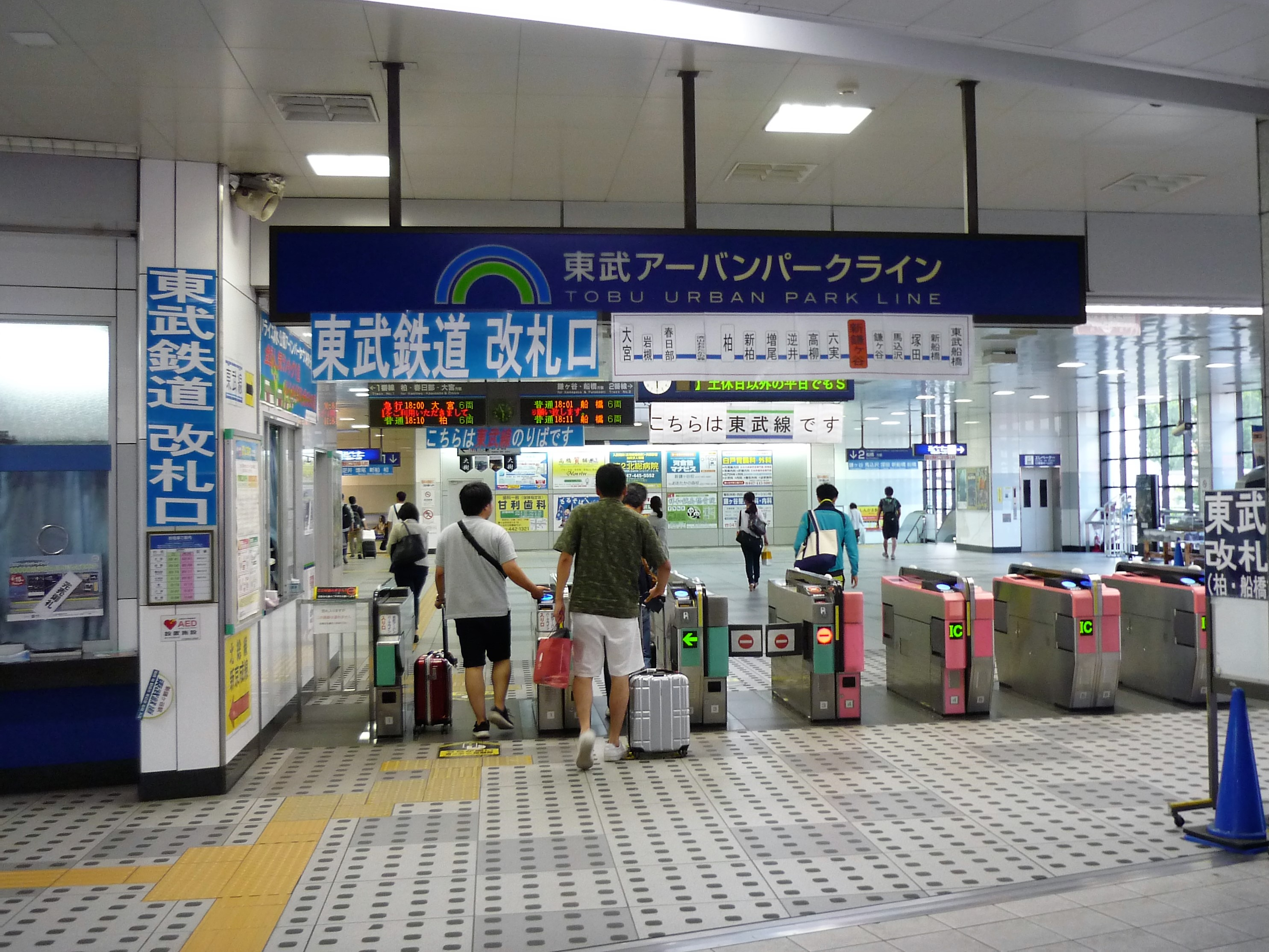 東武鉄道 新鎌ヶ谷駅 改札口 Panasonic Lumix DMC-FS3